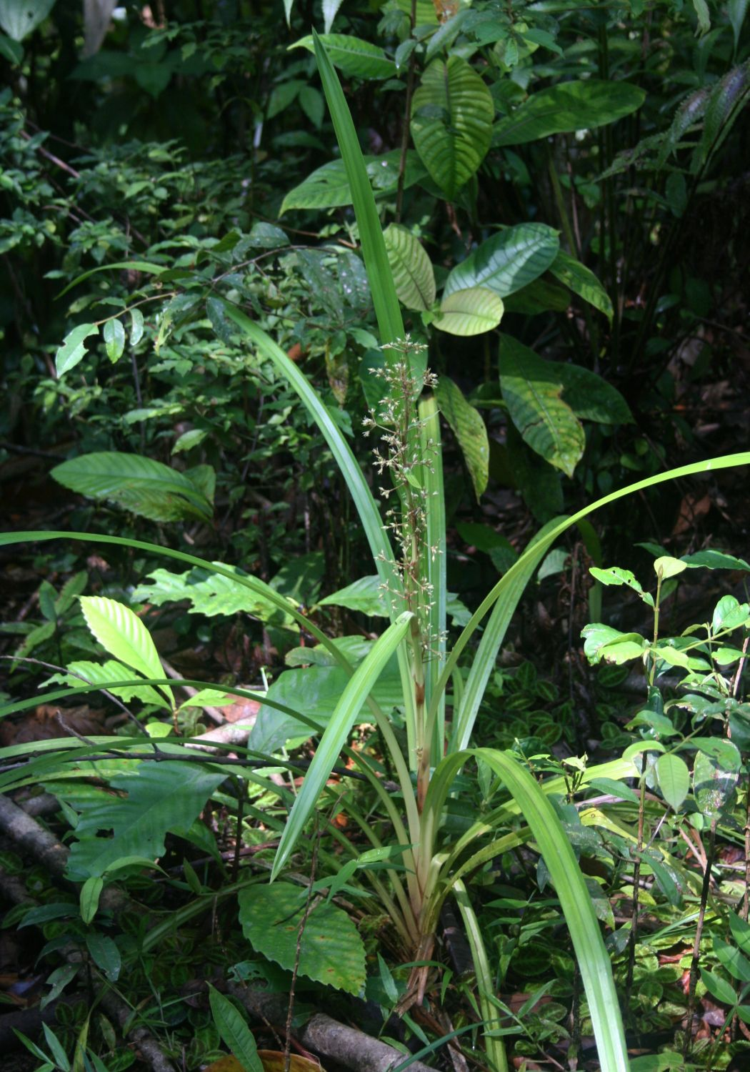 Becquerelia cymosa, Sauergräser (Cyperaceae) - Costa Rica: Prov. Puntarenas, La Gamba NW Golfito, zwischen "Fila Trail" und Valle Bonito